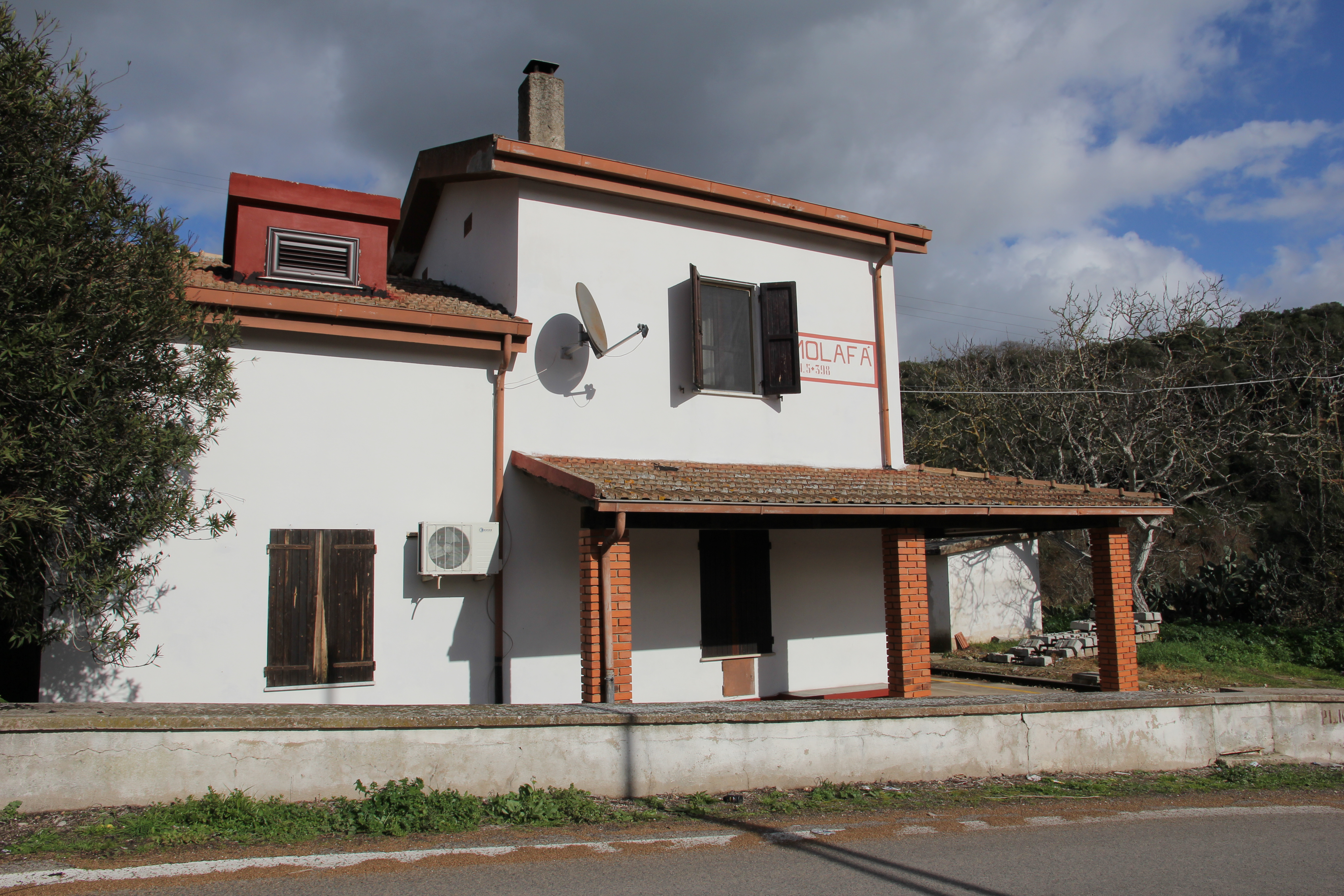 Sassari - Stazione ferroviaria di Molafà